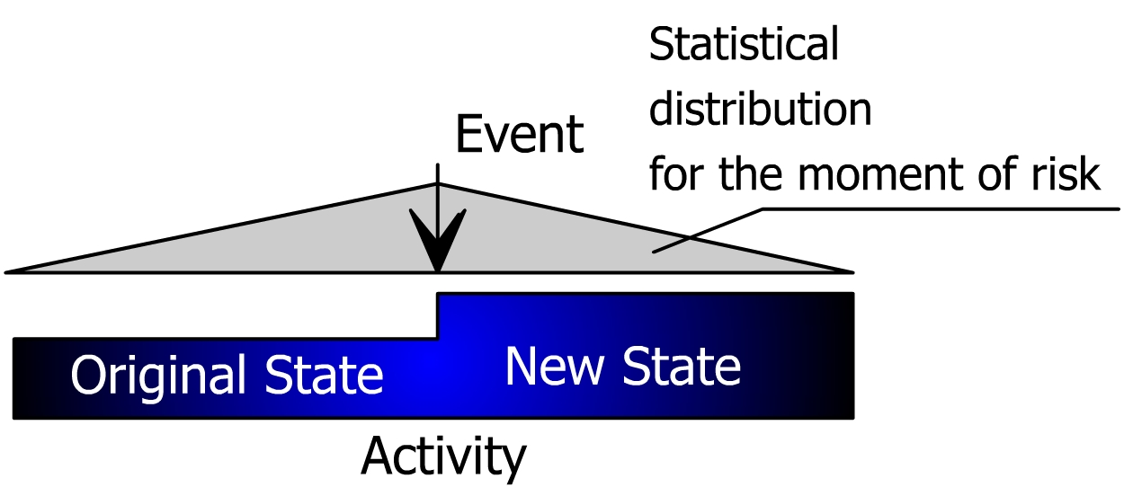 Event Chain Methodology